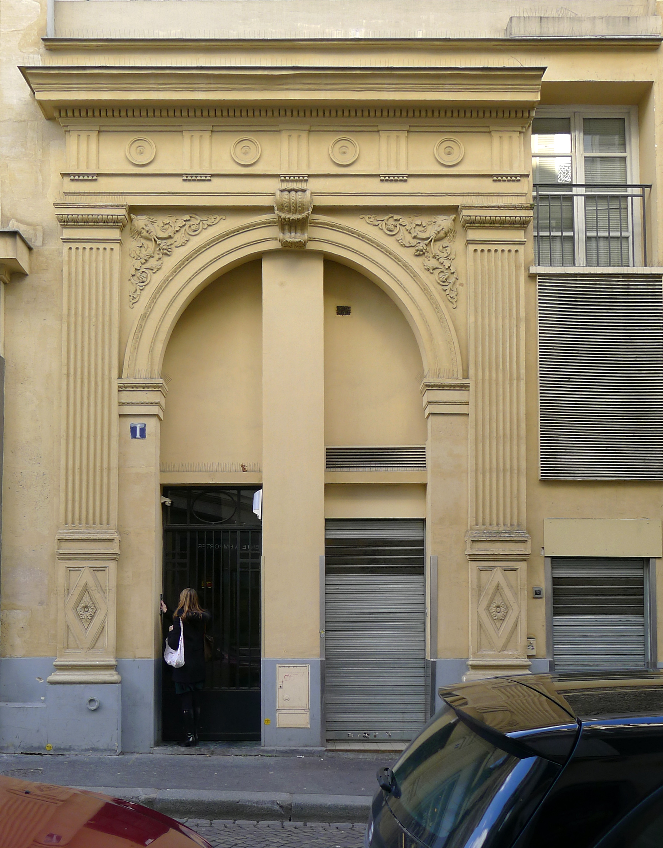 Rue Troyon (n°1) - Paris XVII